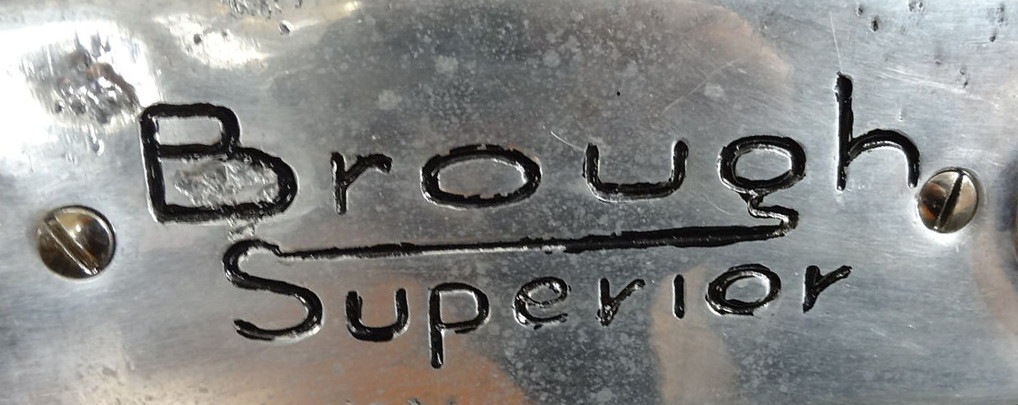 Logotipo de Brough Superior